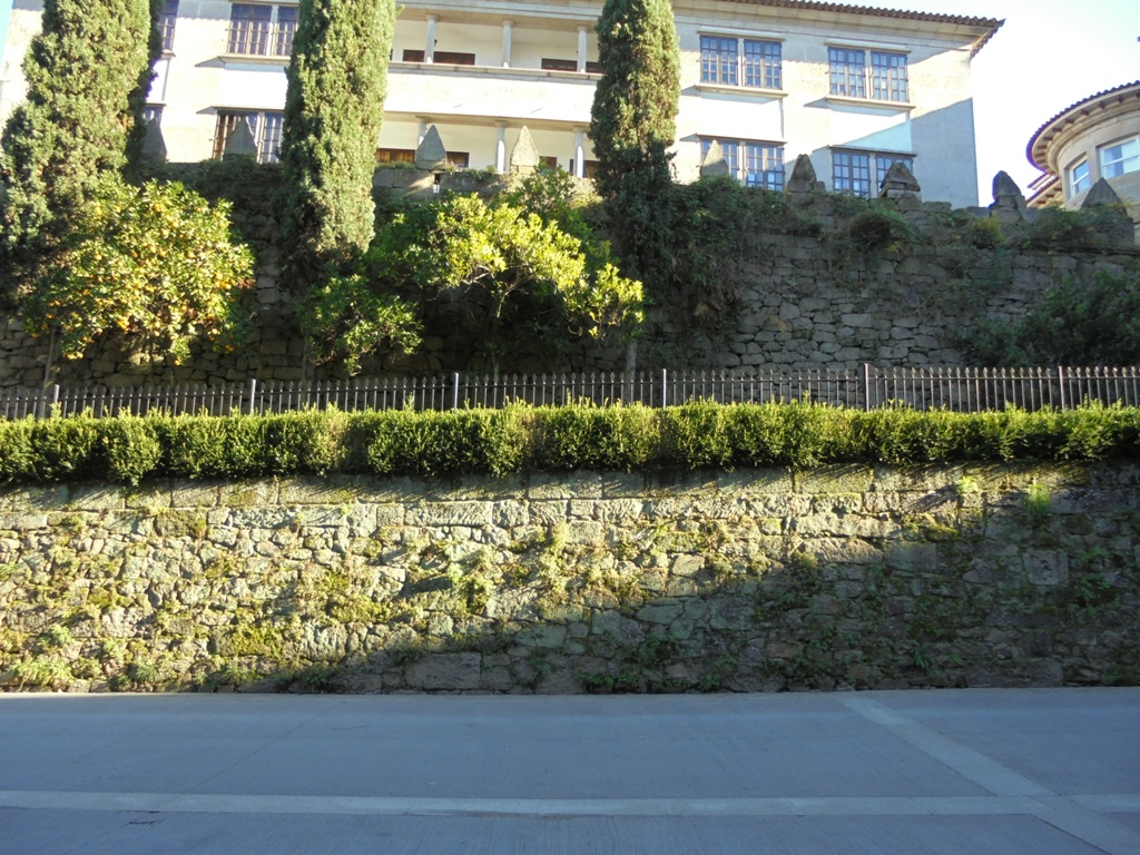 Muralla Medieval de Pontevedra capital